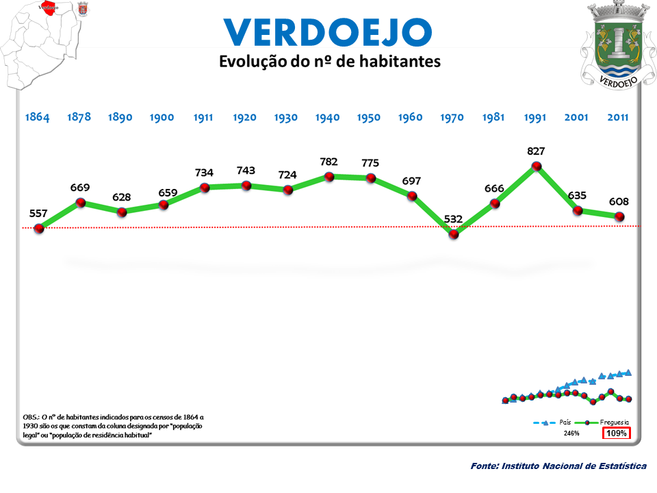 Censos 1864/2011